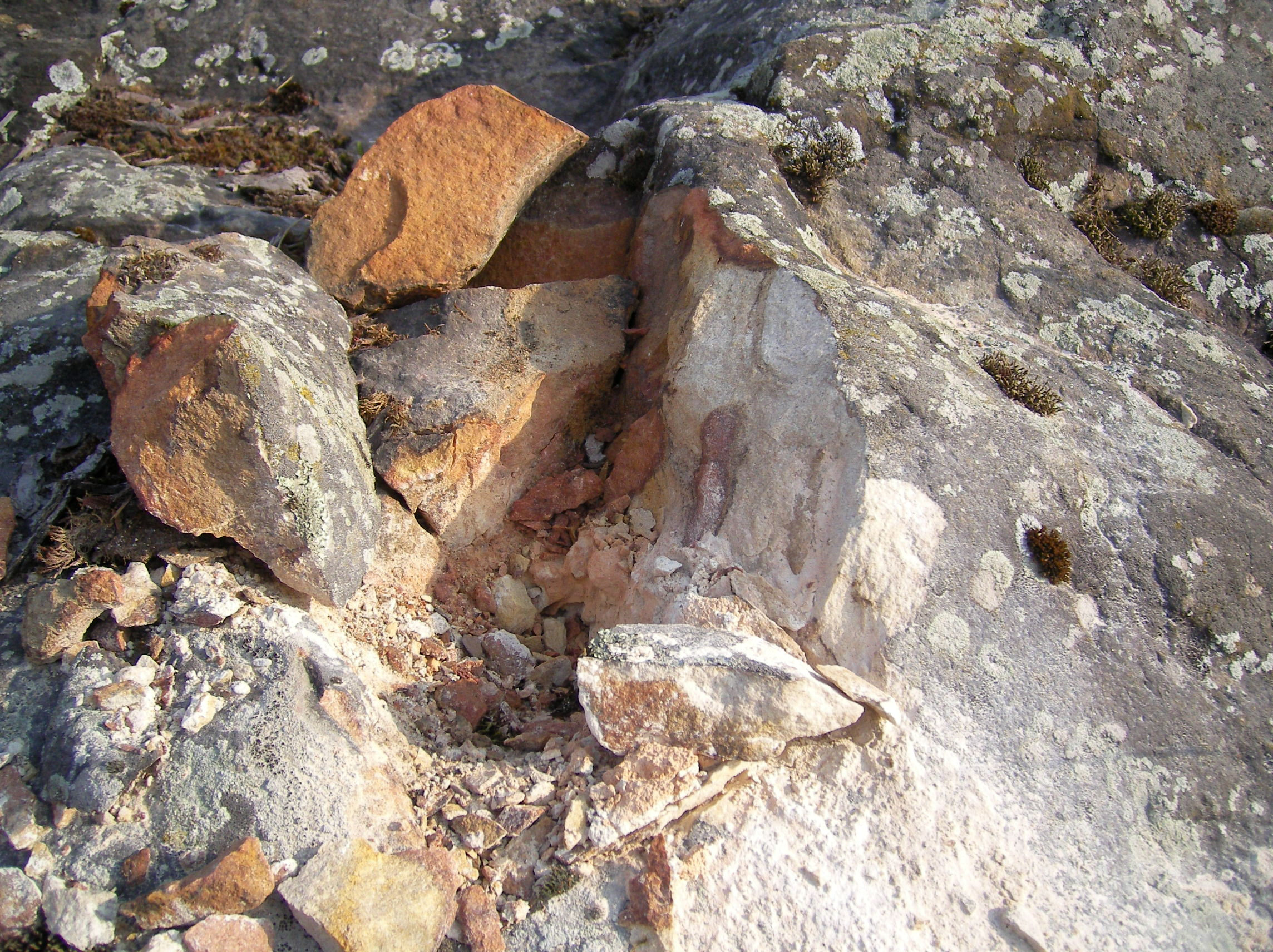 Ein als Geotop kartierter und in die Naturdenkmalliste eingetragener Kallmünzer wurde von Unbekannten beschädigt und gewährt deshalb einen Einblick in seine innere Struktur.